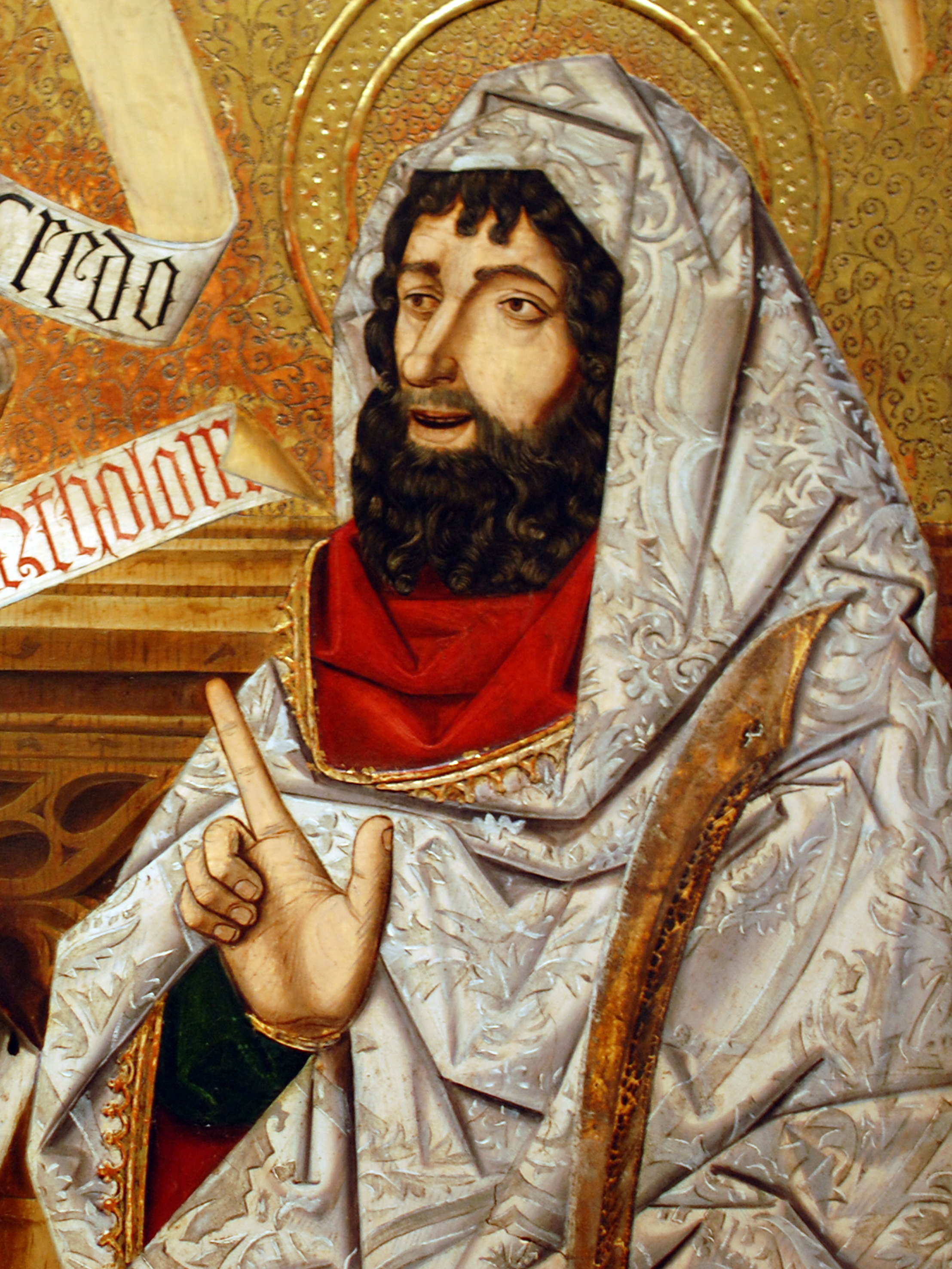 Aragonés: Sant Bertolomeu